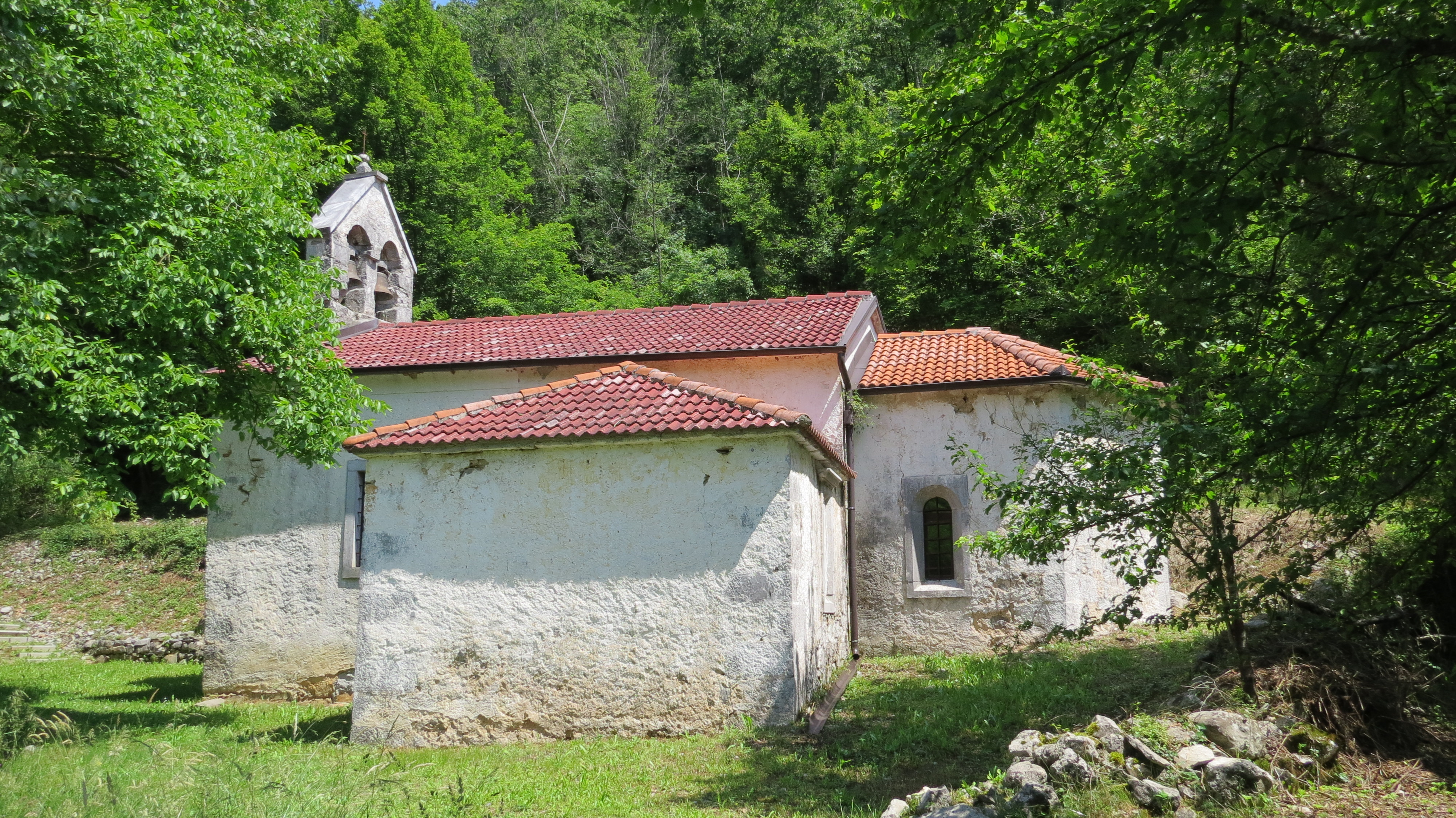 Cerkev sv. Antona (ali sv. Kancijana) pri vasi Mahniči.